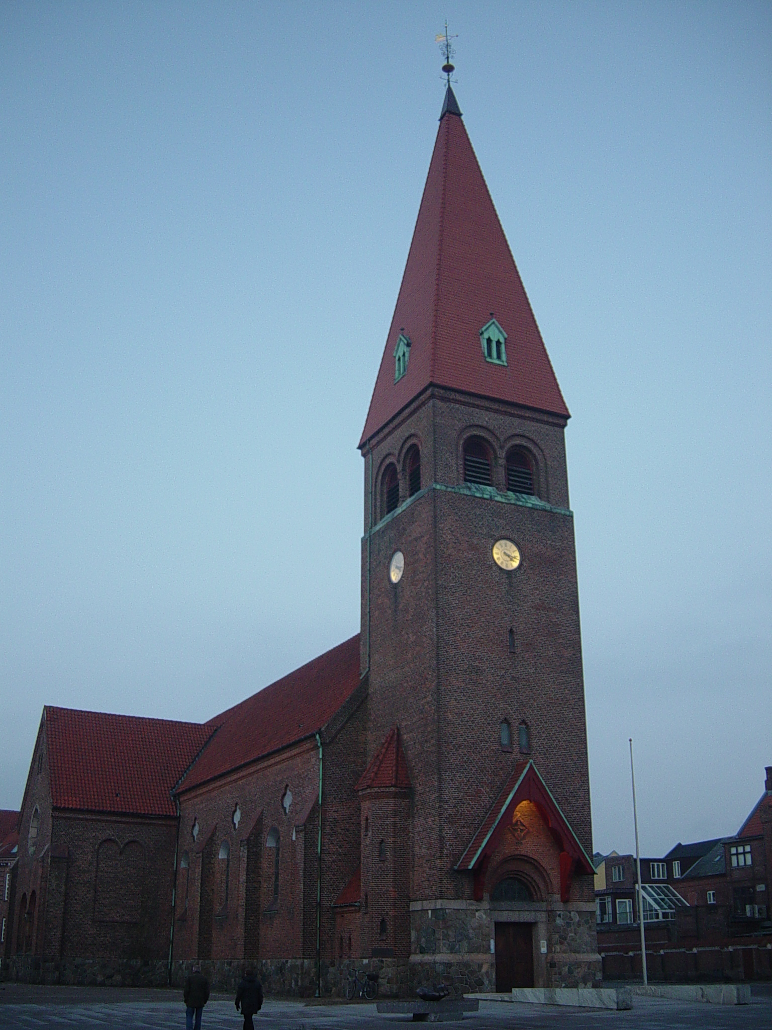 Holstebro Kirke fra 1907